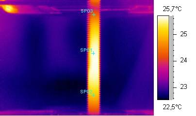 Prova statica di trazione mono-assiale associata al rilievo termico della superficie di un componente meccanico, nella fattispecie di un bullone in acciaio ad alta resistenza.